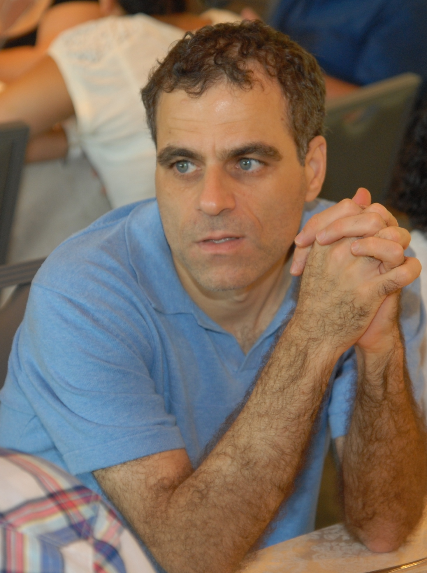 רן רז, 2011